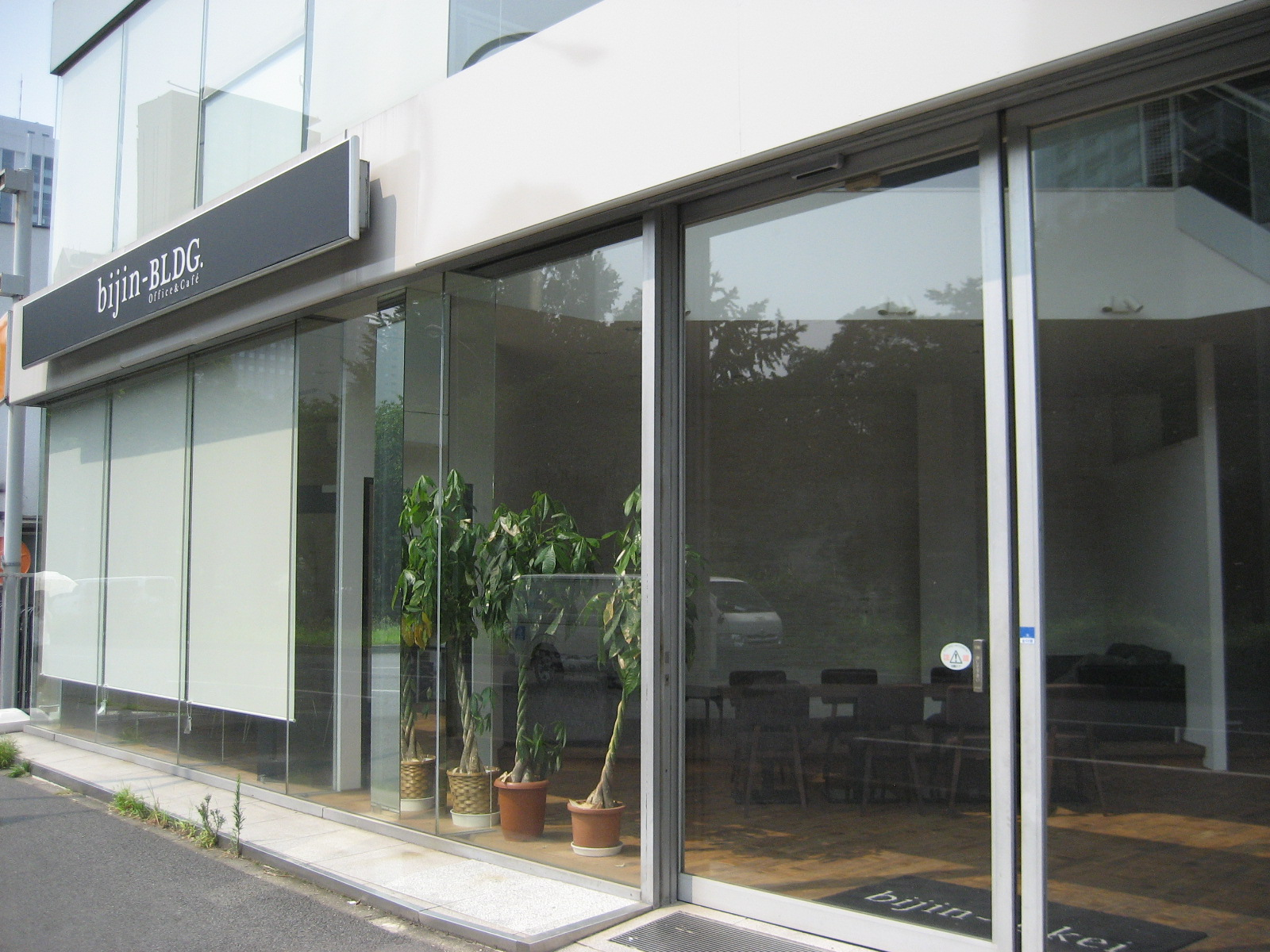 美人時計本社（東京都港区）